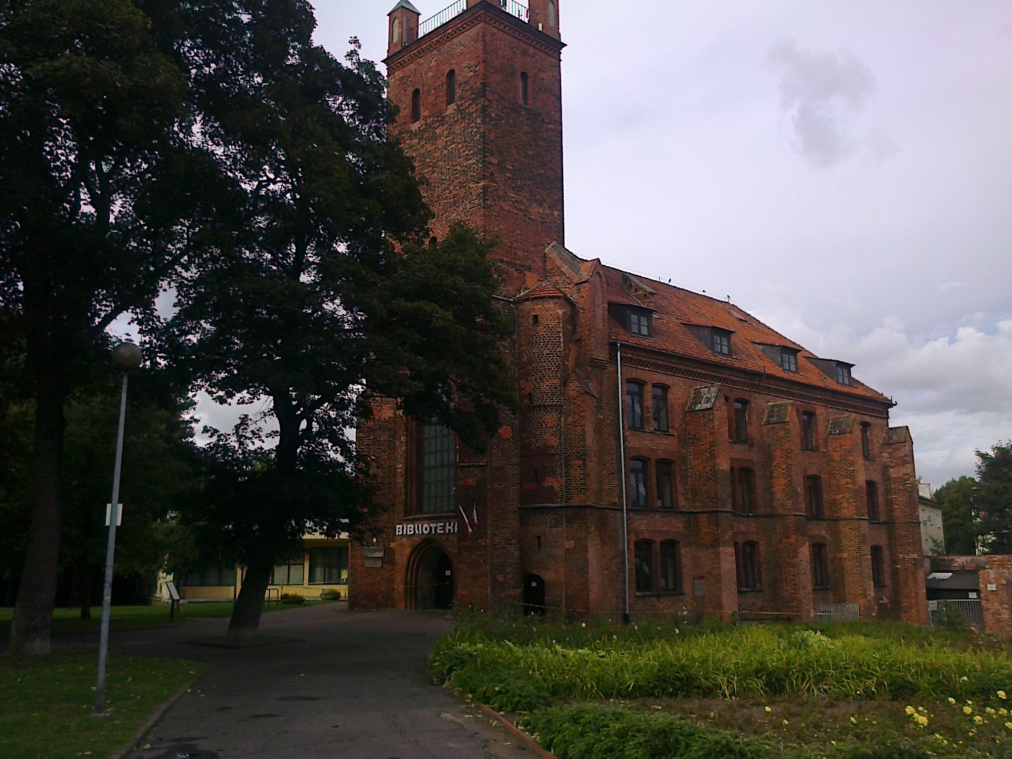 Słupsk, ul. Grodzka 3 - dawny kościół klasztorny norbertanek p.w. Św.Mikołaja, obecnie Miejska Biblioteka Publiczna, 1 poł. XIV, 1771-1772, 1971.